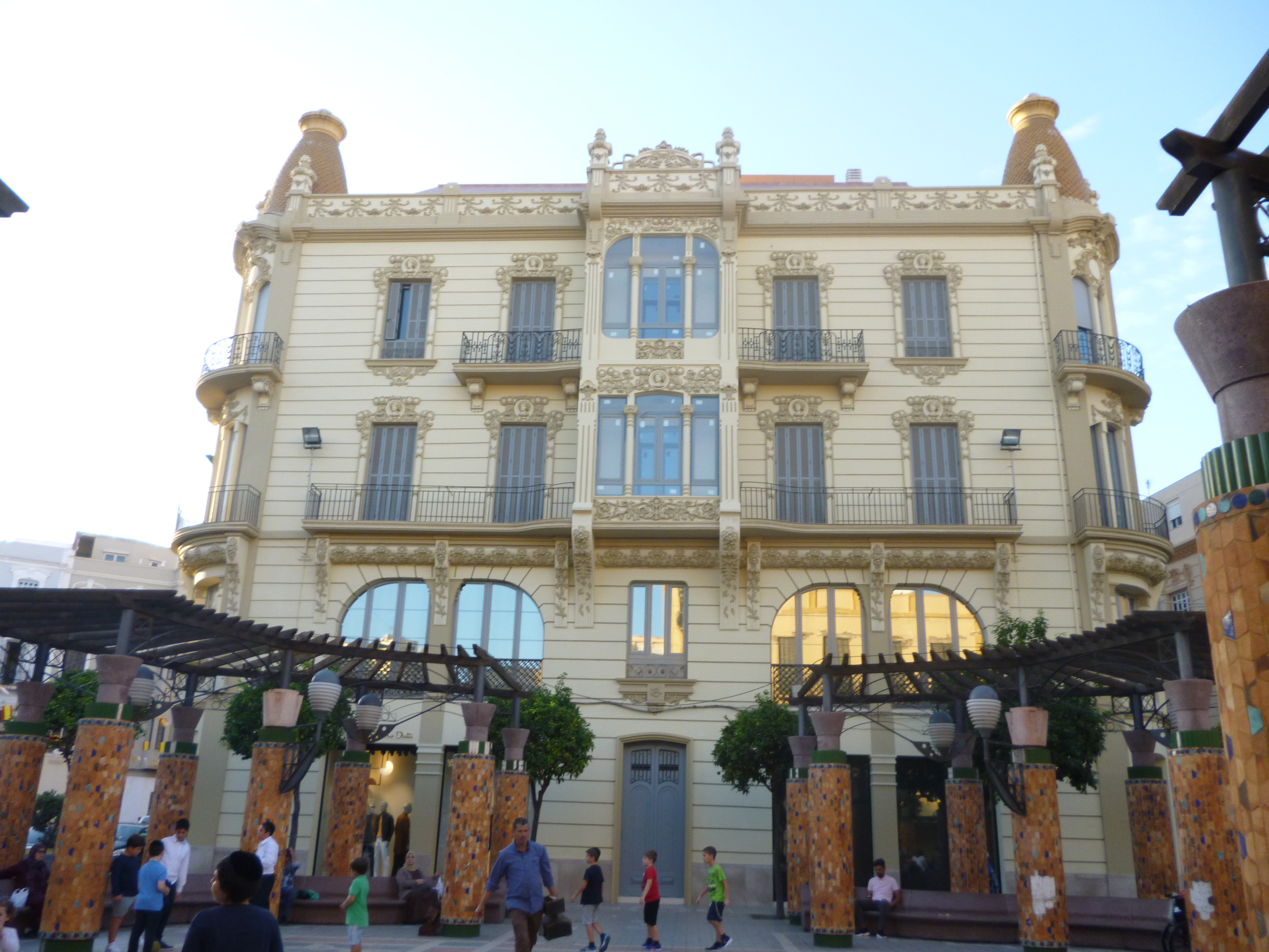 Grandes Almacenes La Reconquista, Melilla